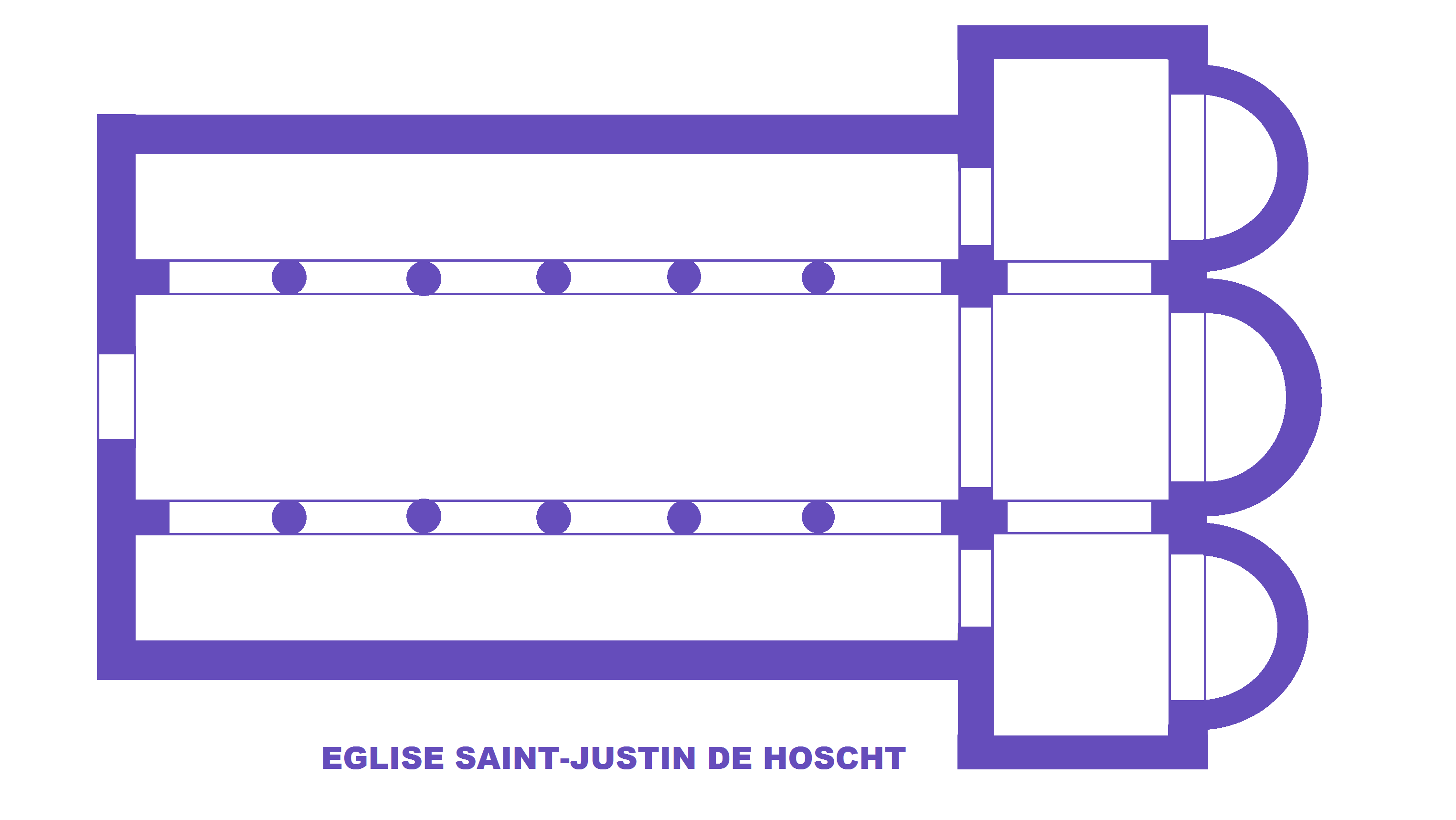 Eglise Saint-Justin de Hoscht, plan carolingien